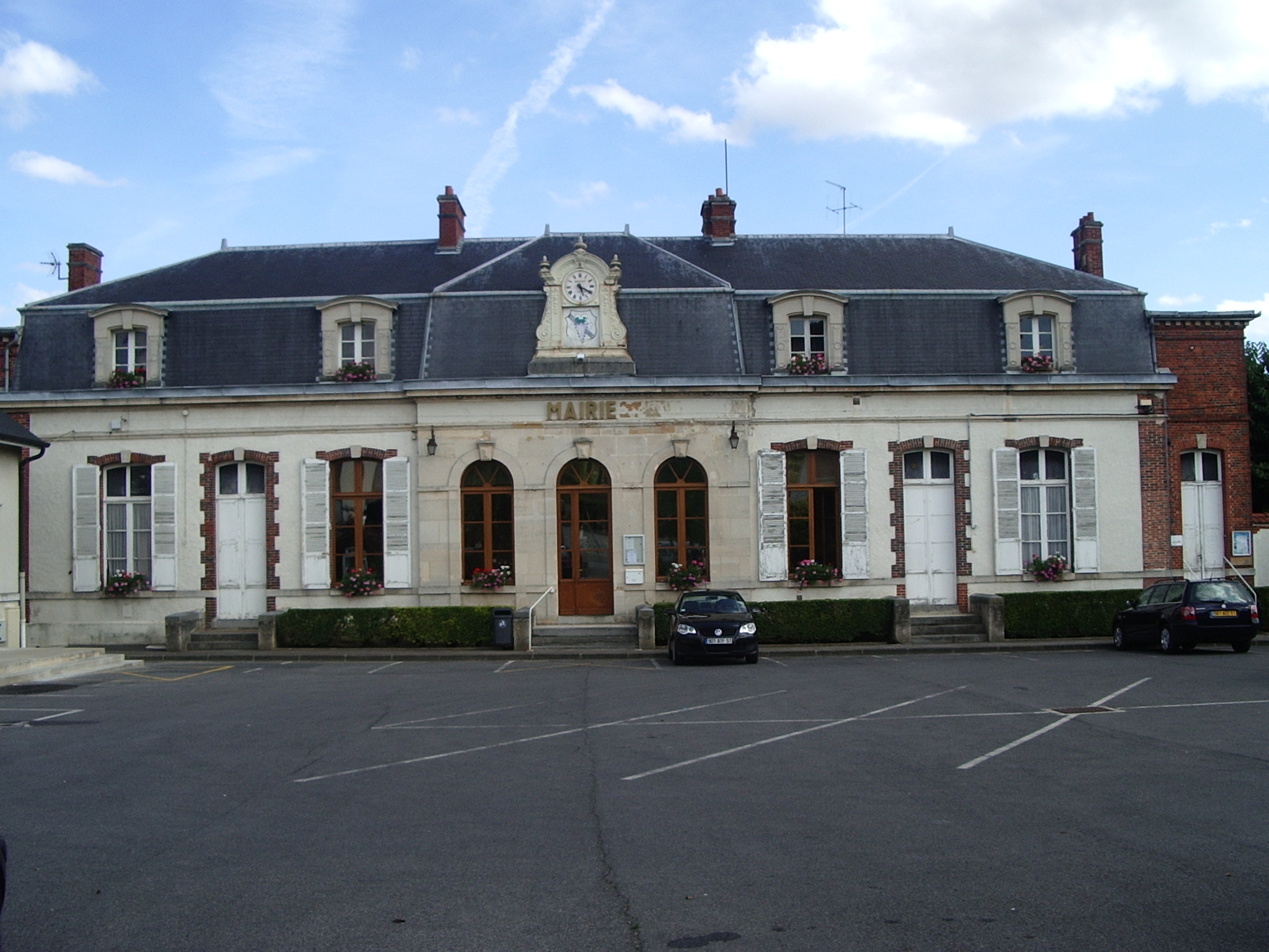 Mairie de pierry